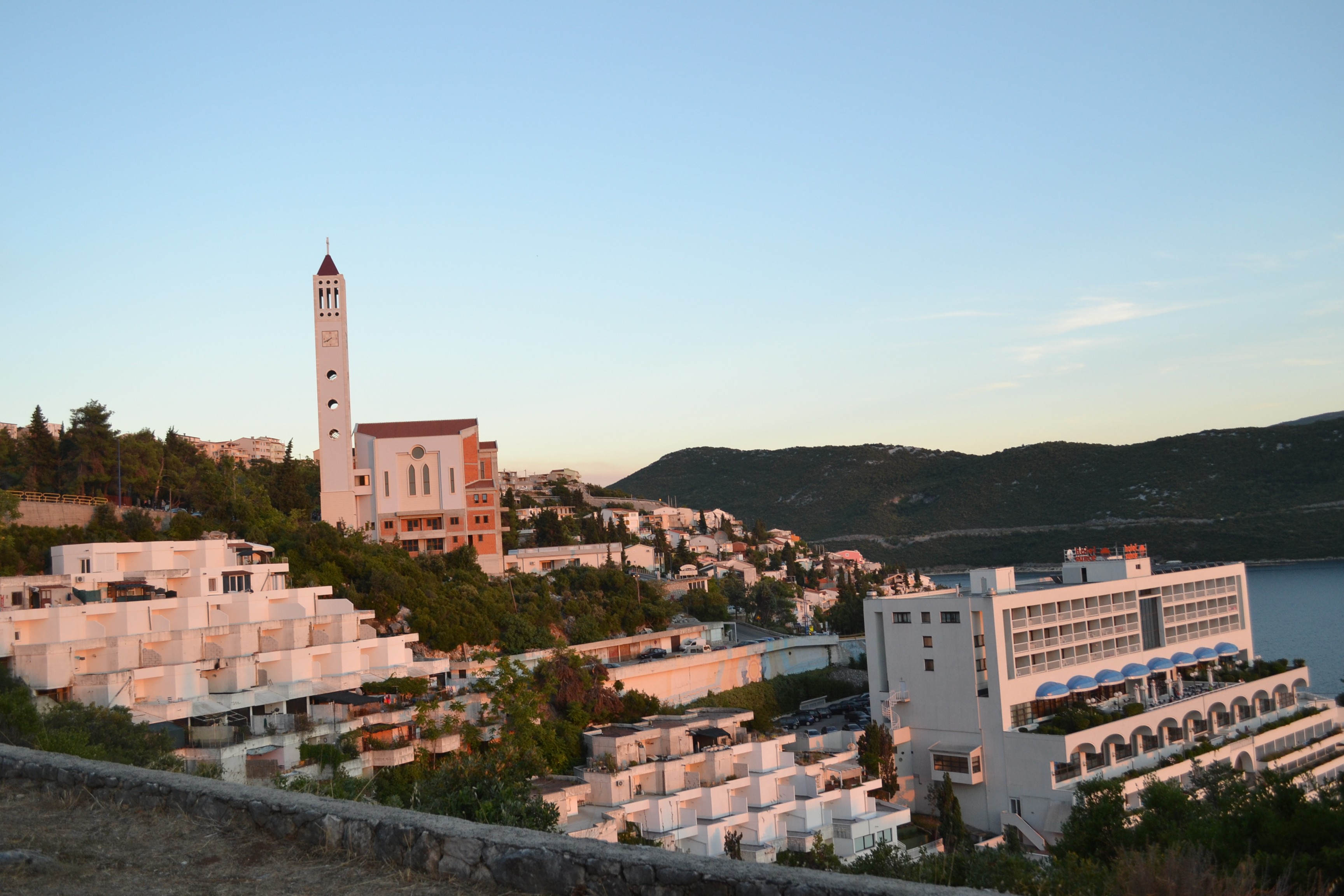 Neum